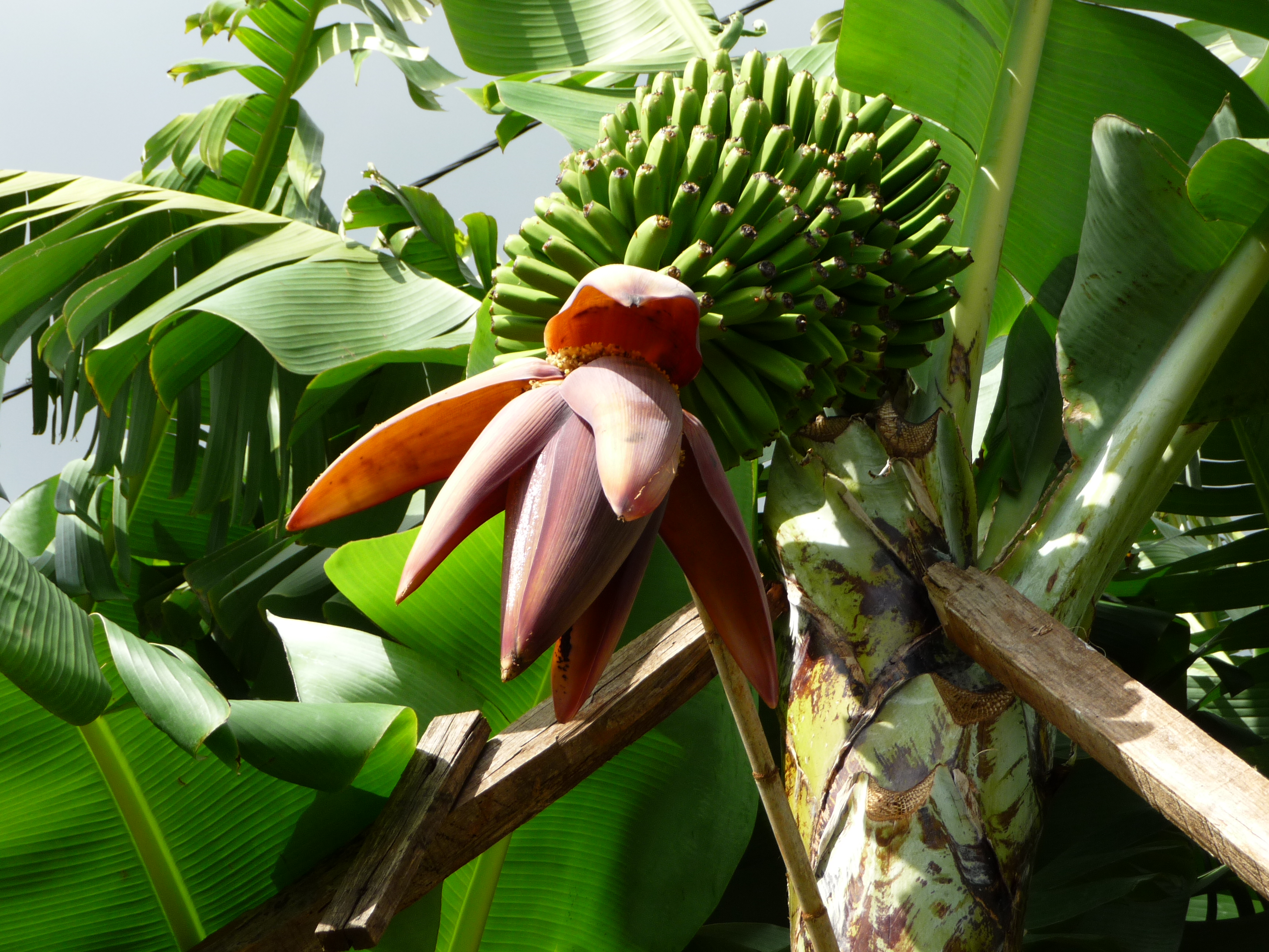 Banán termése (Madeira, Funchal Santo António negyedében)